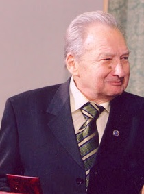 Островський Аполлінарій Львович